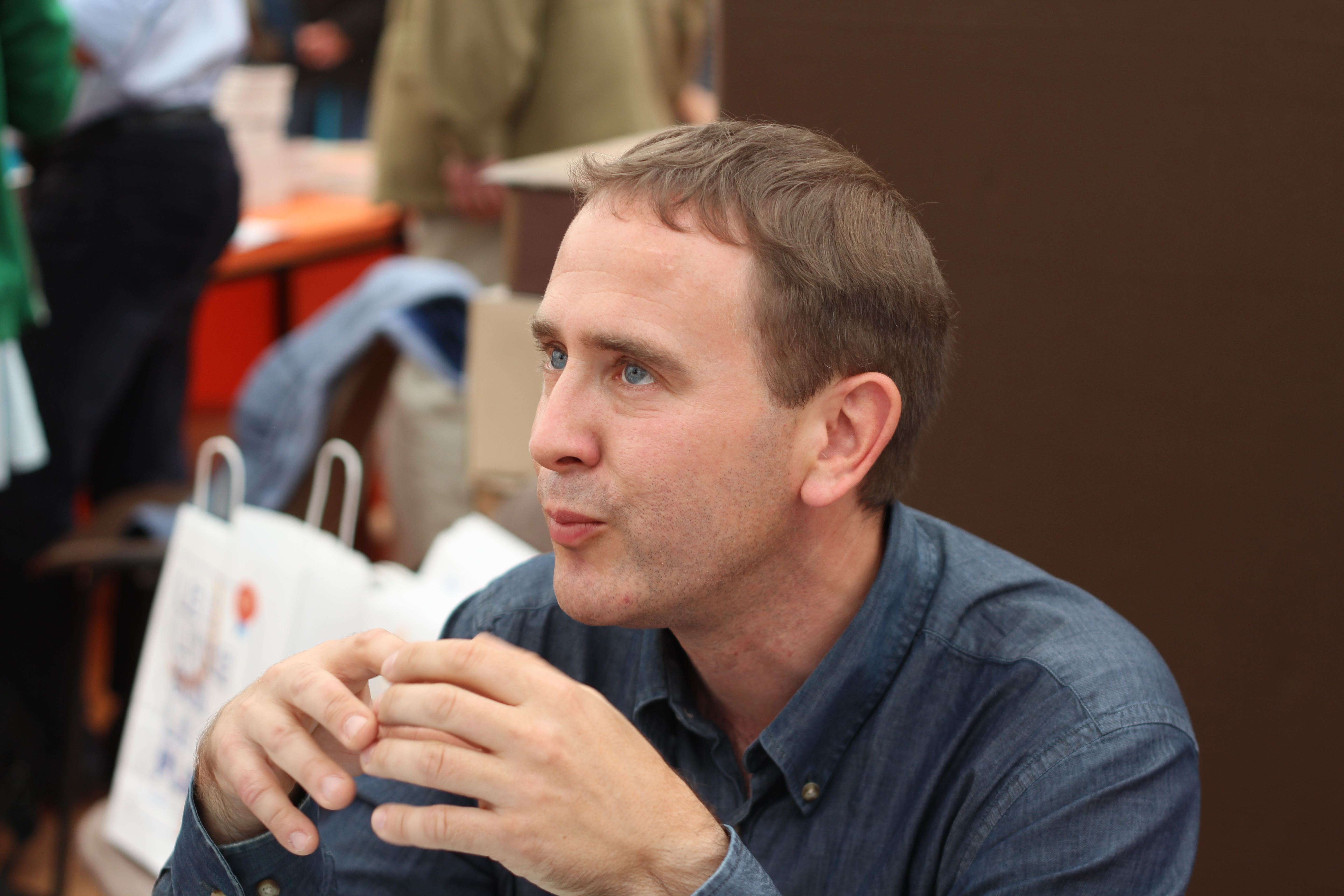 Benjamin Berton au Livre sur la Place 2014